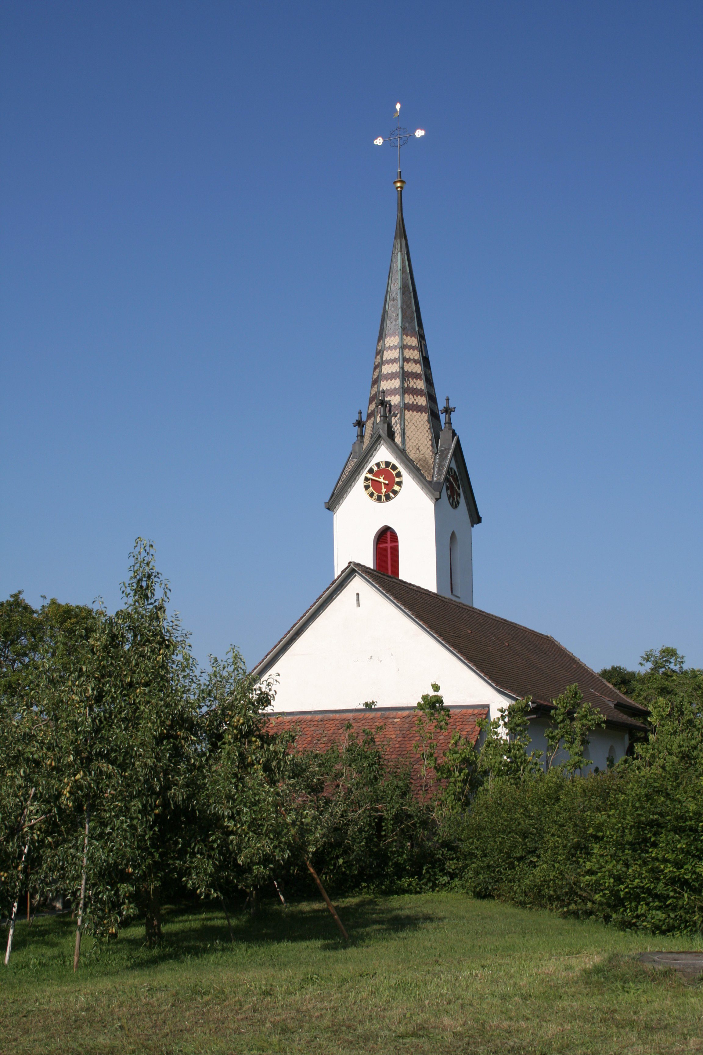 Die reformierte Kirche von Wengi, Bezirk Büren, Schweiz